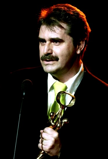 Peter Marcin preberá cenu Absolútny OTO